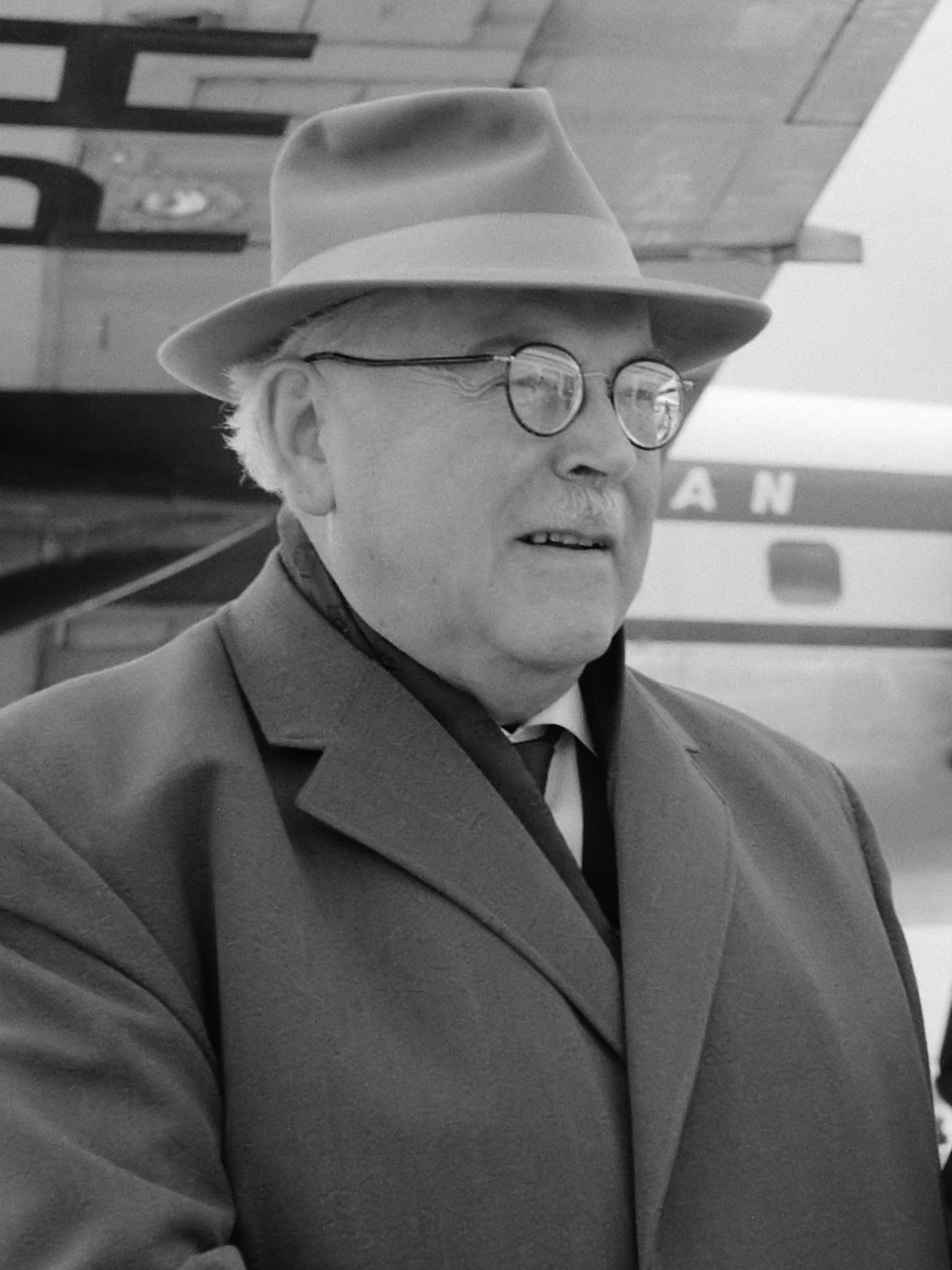 Aankomst Zw. Professor dr. W. Loffler 10 mei 1961